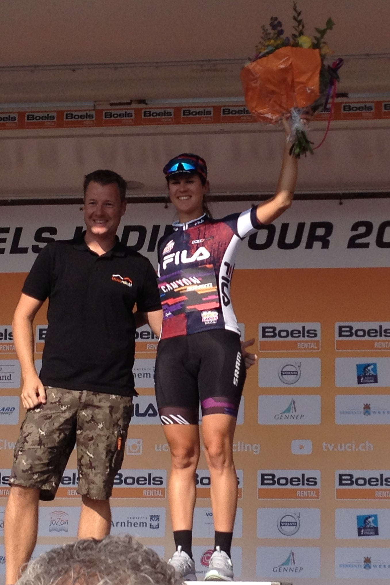 5e etappe van de Boels Ladies Tour 2018 door Zuid-Limburg, finish in Sittard op het Tom Dumoulin Bike Park. Elena Cecchini in de sprinttrui.